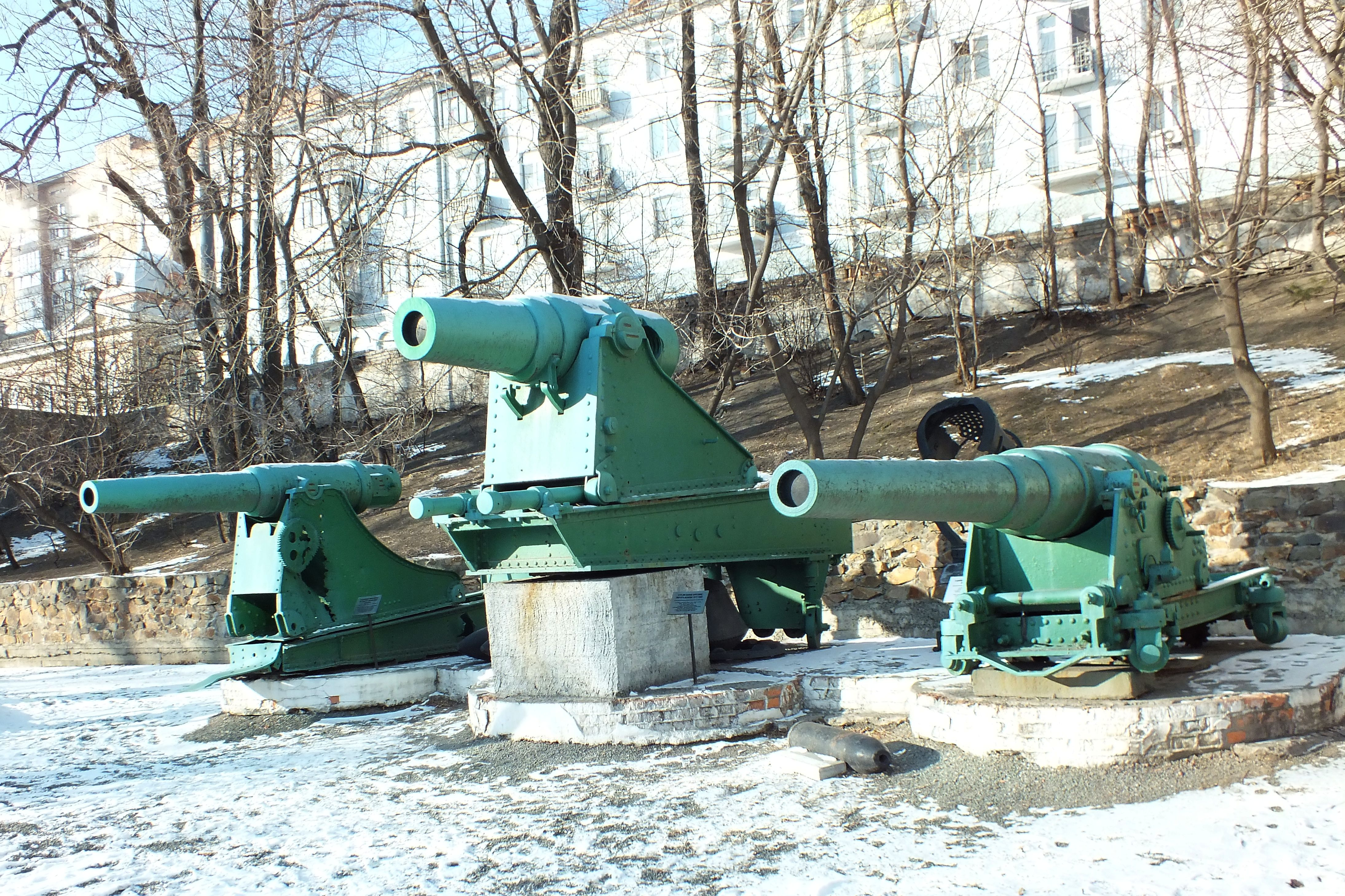 Пушки Порт-Артура во Владивостоке